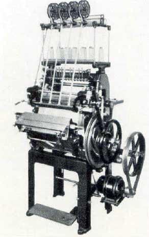 Fadenbuchheftmaschine